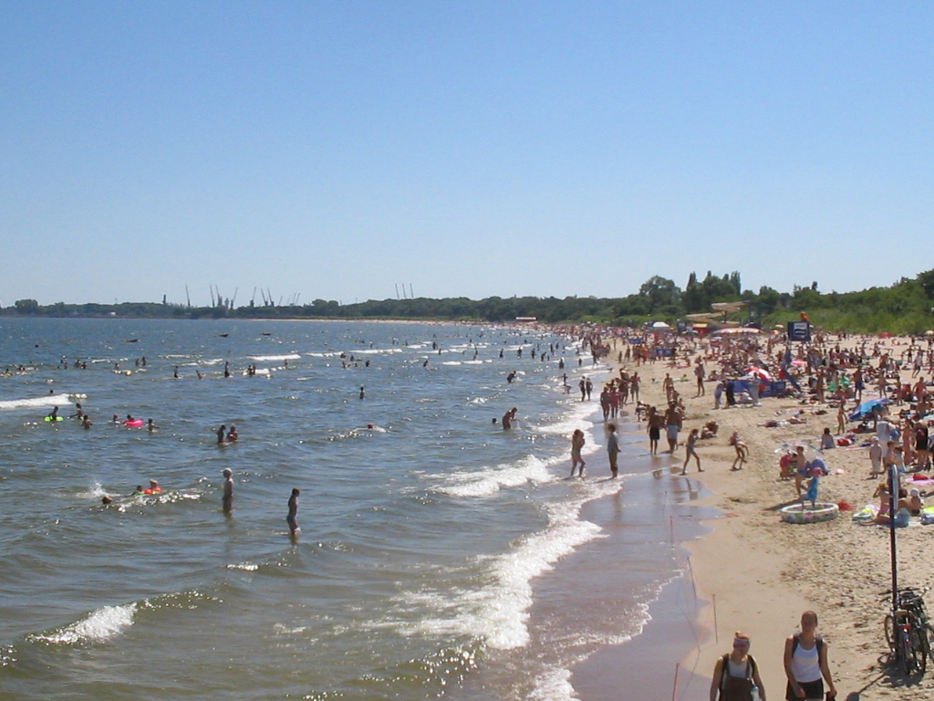 Beach Gdansk, Poland, 2005